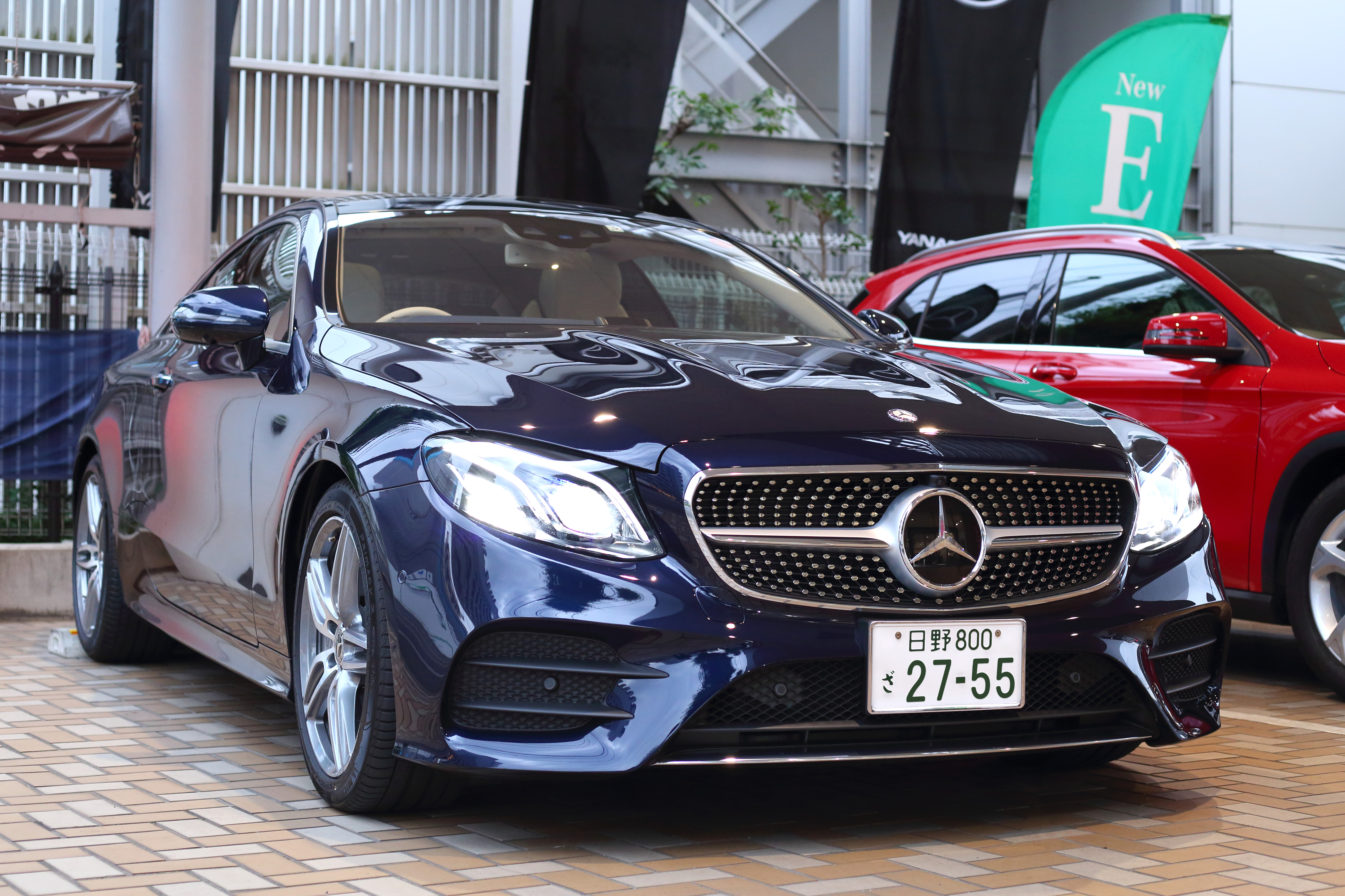 Eクラスクーペ（300）日本仕様。